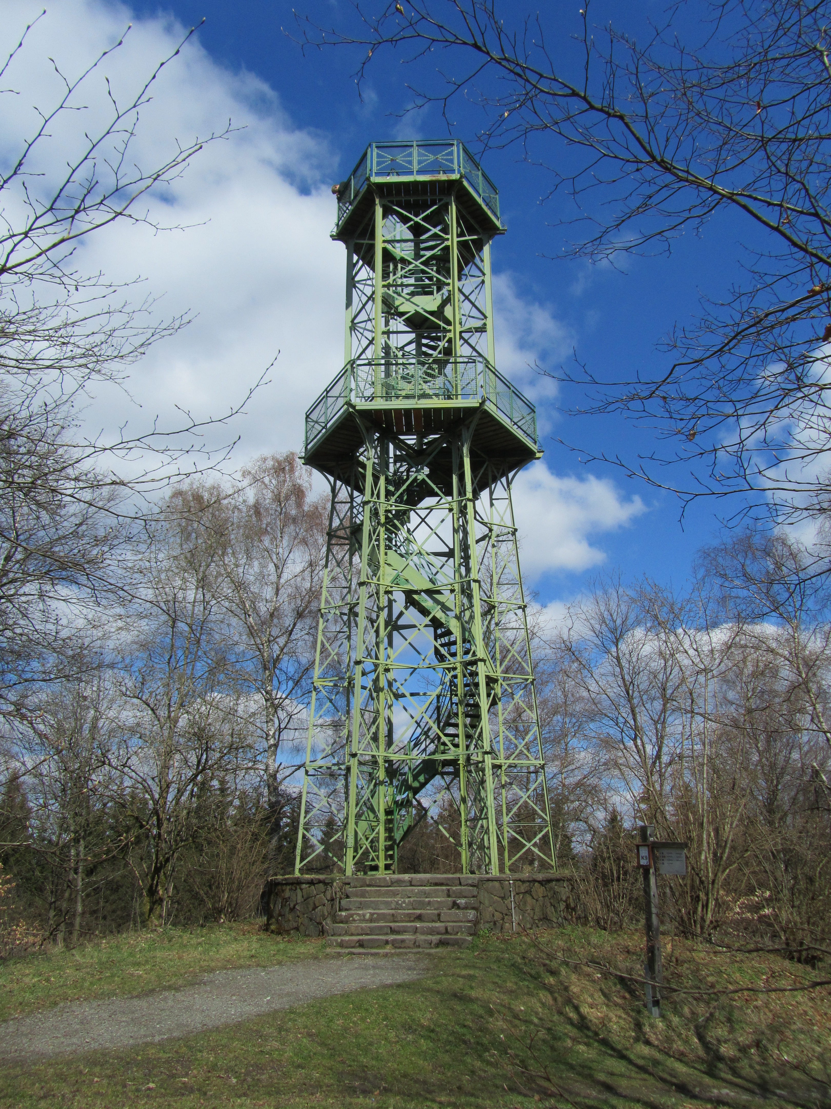 Der Aussichtsturm (17 m) auf dem Wilzenberg (658 m) im Sauerland bei Schmallenberg.